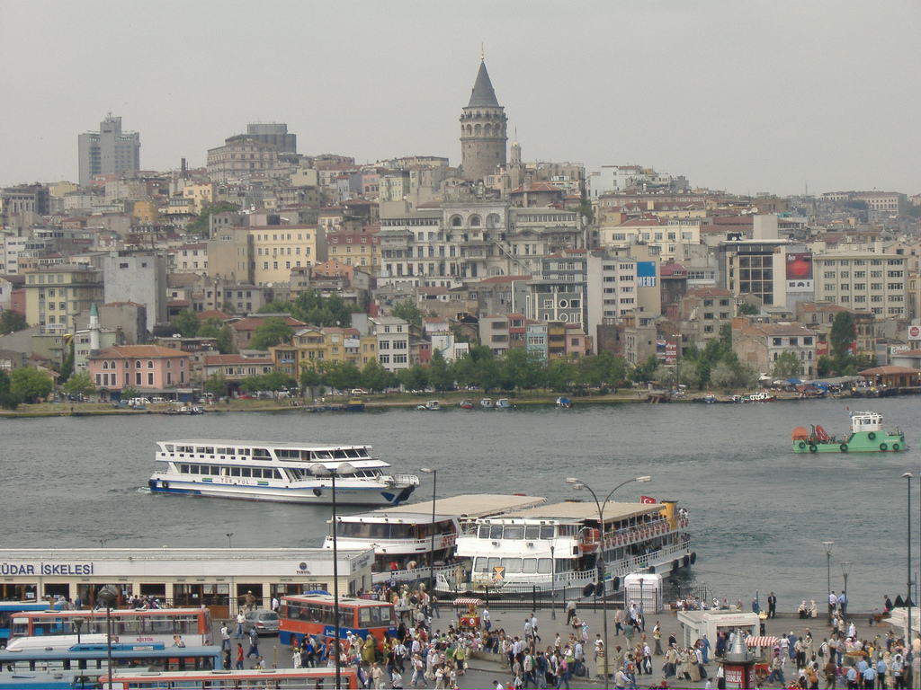 Haliç